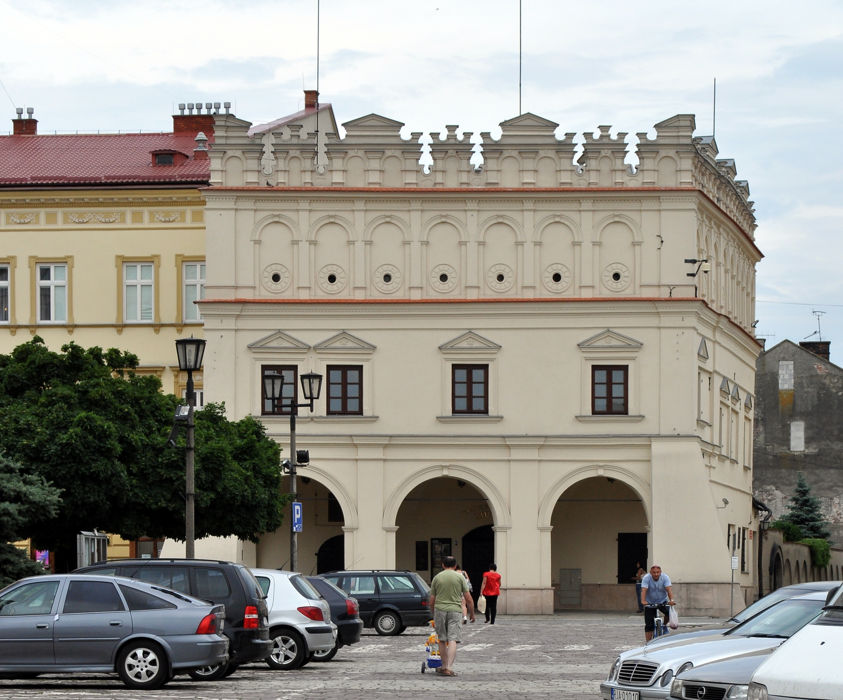 kamienica Orsettich, Jarosław, Rynek 4